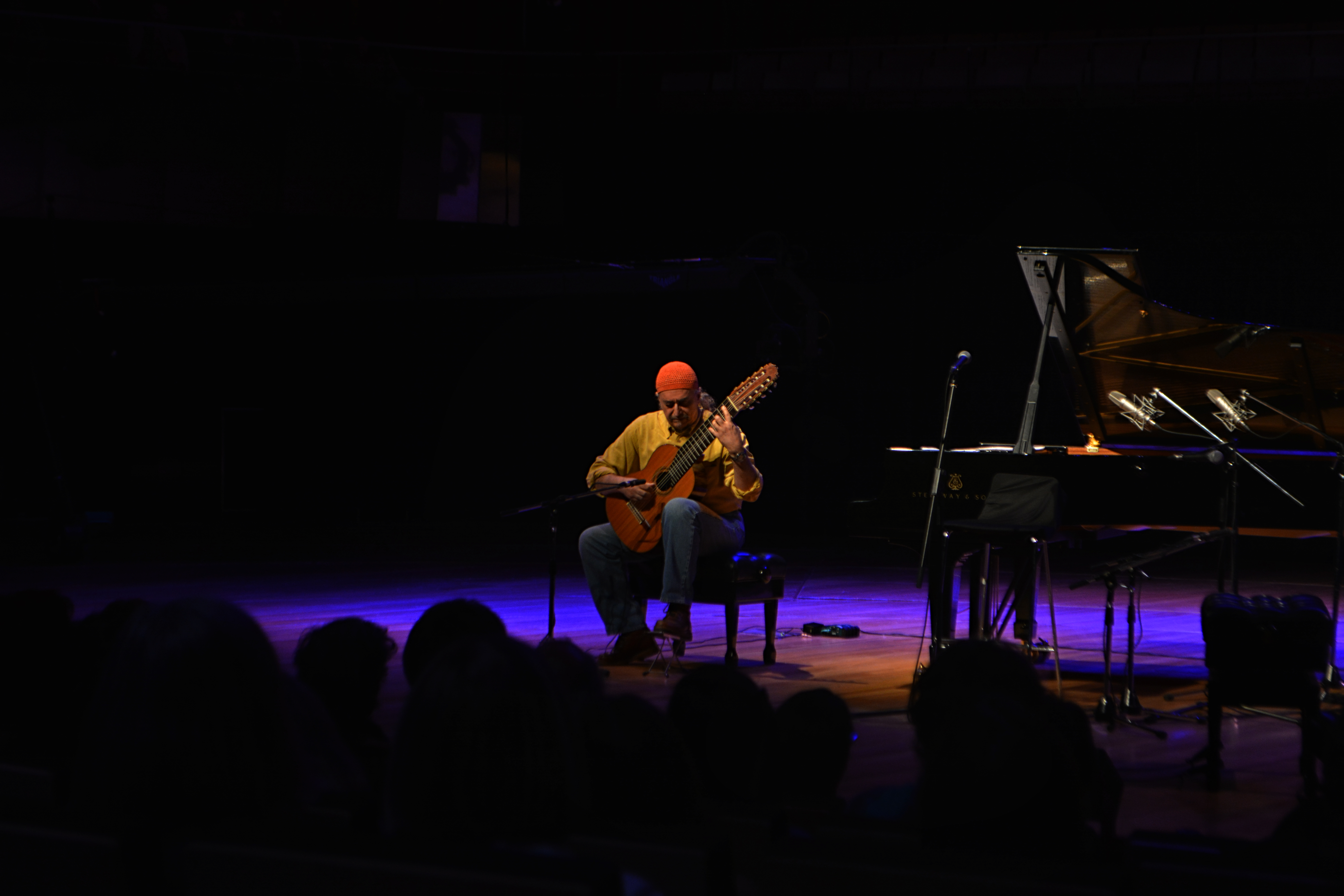 Egberto Gismonti. Sala Sinfónica Centro Cultural Néstor Kirchner, Buenos Aires, Argentina.